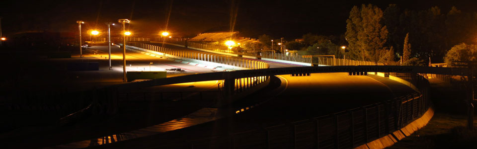 Foto tomada en el Circuito Internacional de Potrero de los Funes. Más información en